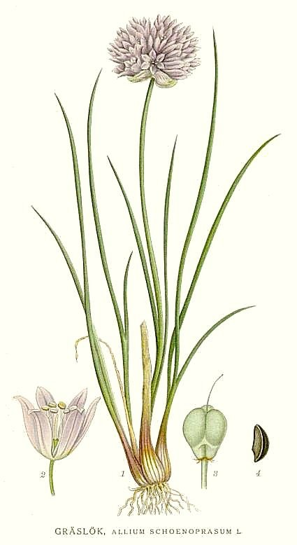 Allium schoenoprasum L. Original Description Gräslök, Allium schoenoprasum L.